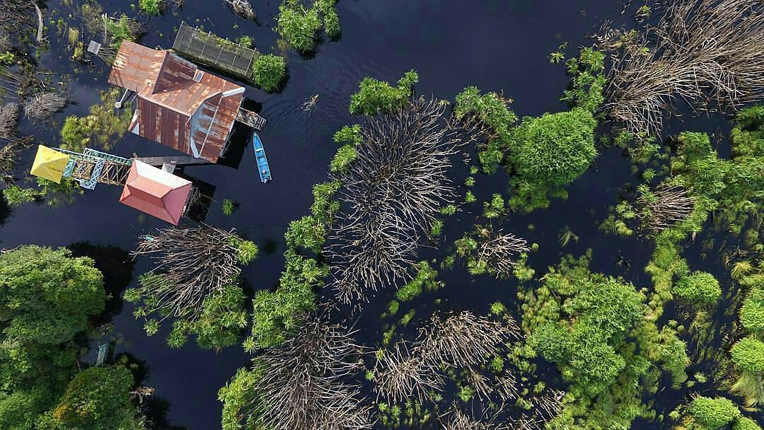 Pos Sungai Koran, Air Hitam Rawa gambut Sebangau